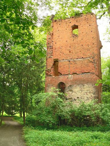 Bergfried der Burgruine Beetzendorf